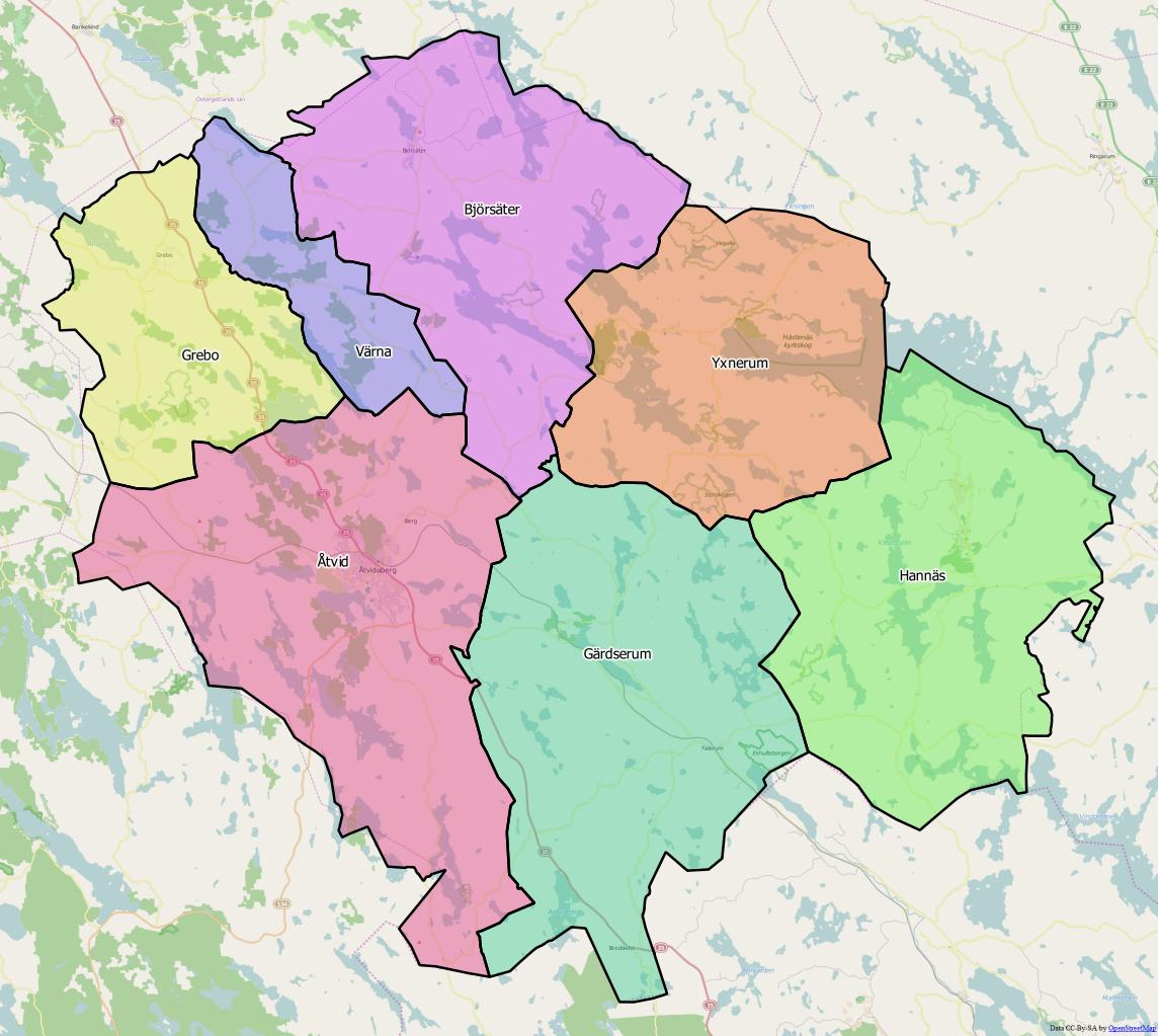 Distriktsindelningen i Åtvidabergs kommun World file 68.78445874577167274 0 0 -68.78445874577167274 1755653.58440593862906098 8048339.85861592087894678